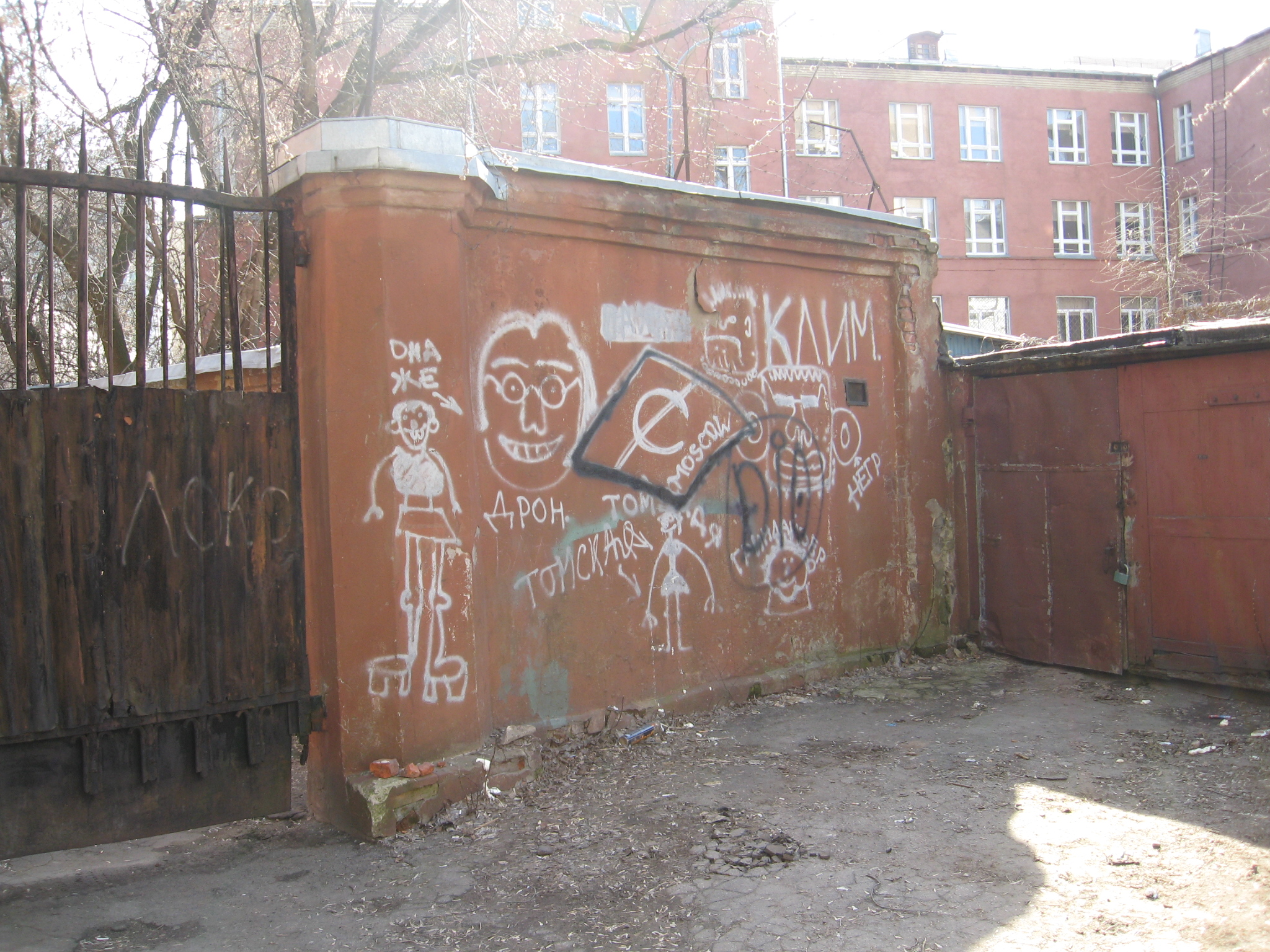 Стена графити